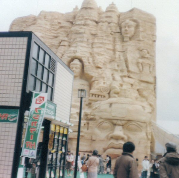 国際科学技術博覧会 集英社館